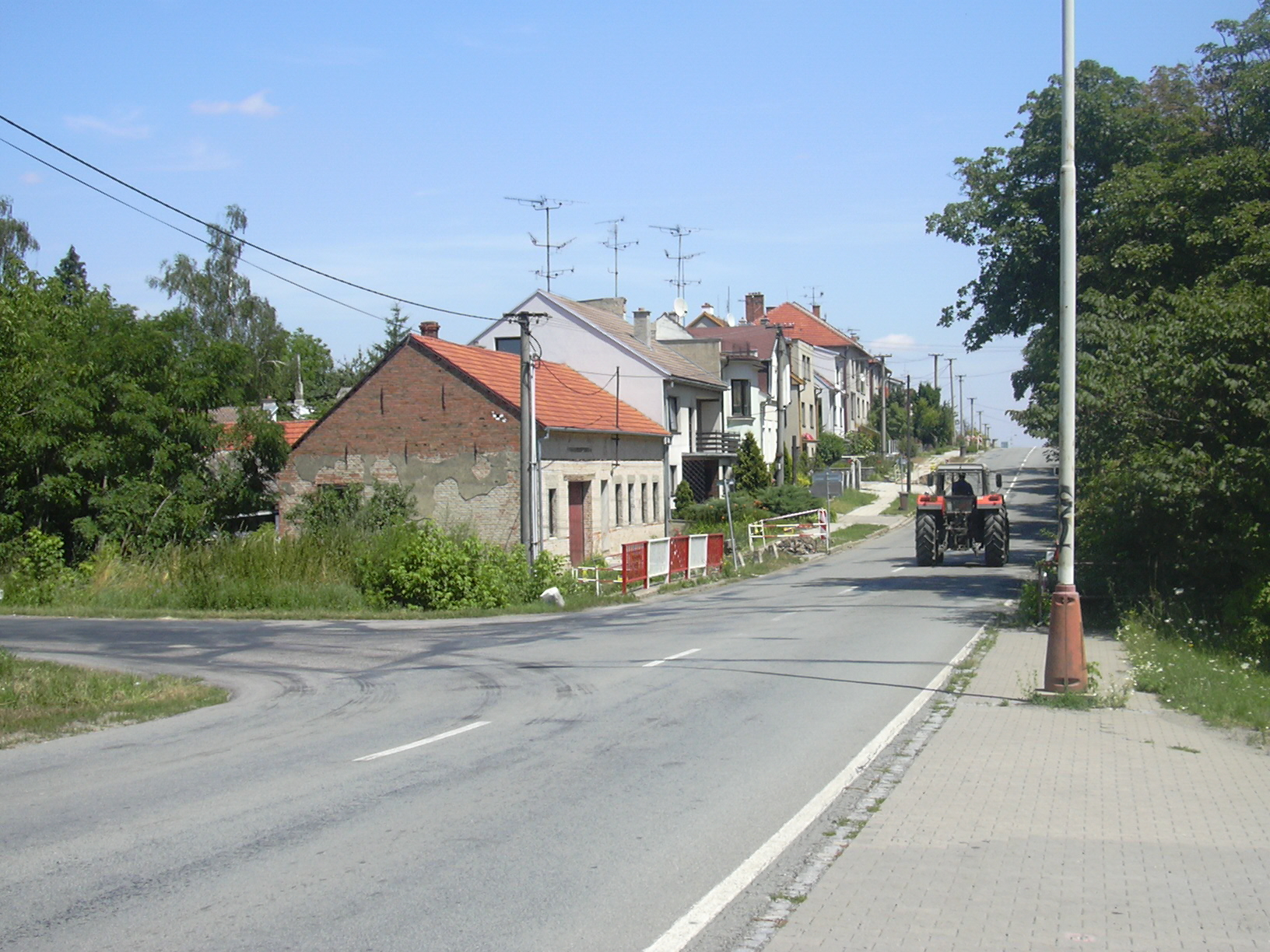 Ulice (Slavíkovice- Czech republic)